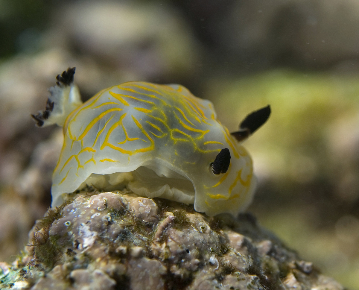 Une halgerda à lignes jaunes (Halgerda formosa) à la Réunion.